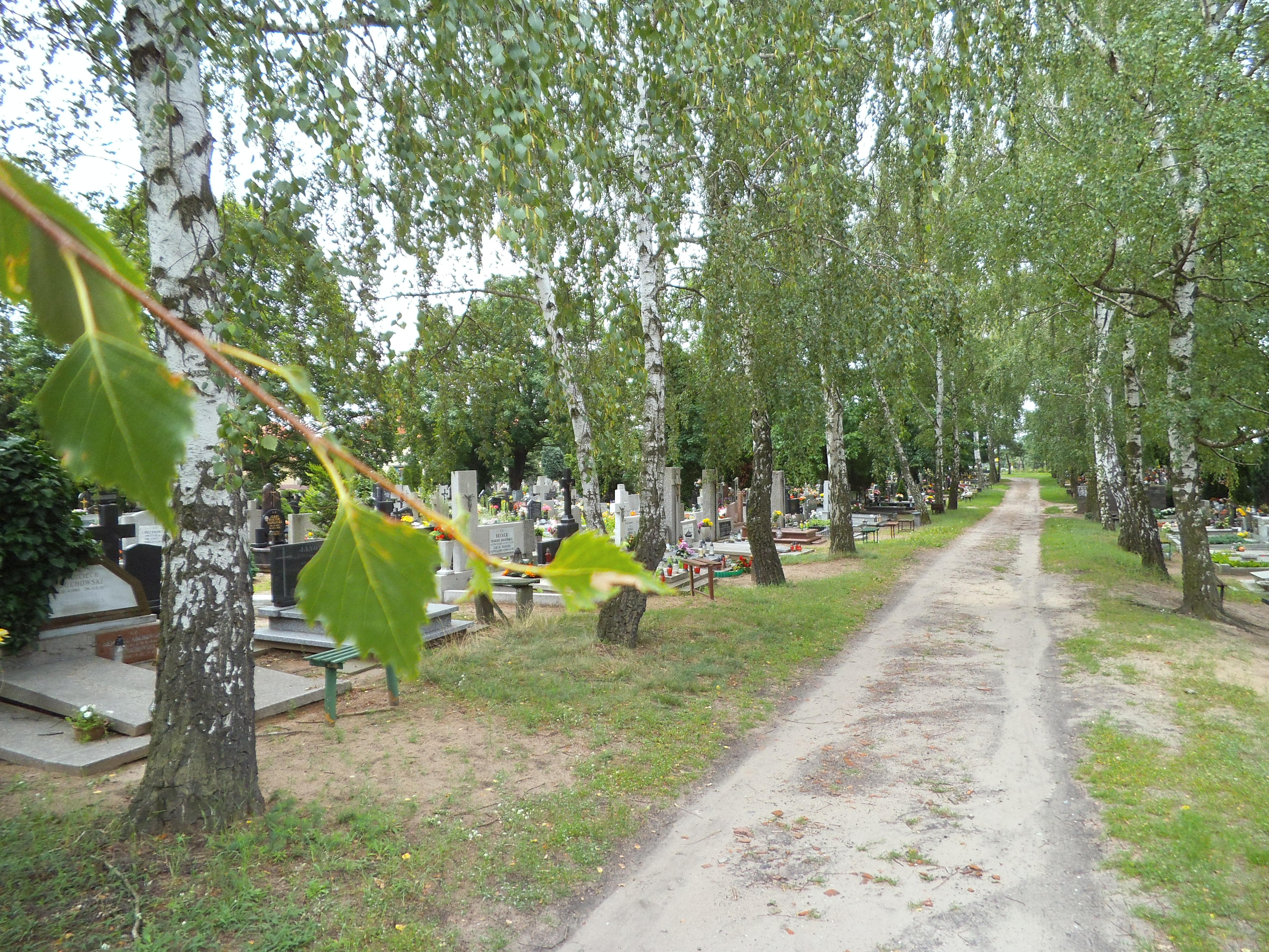 Cmentarz na Kluczykach w Toruniu77